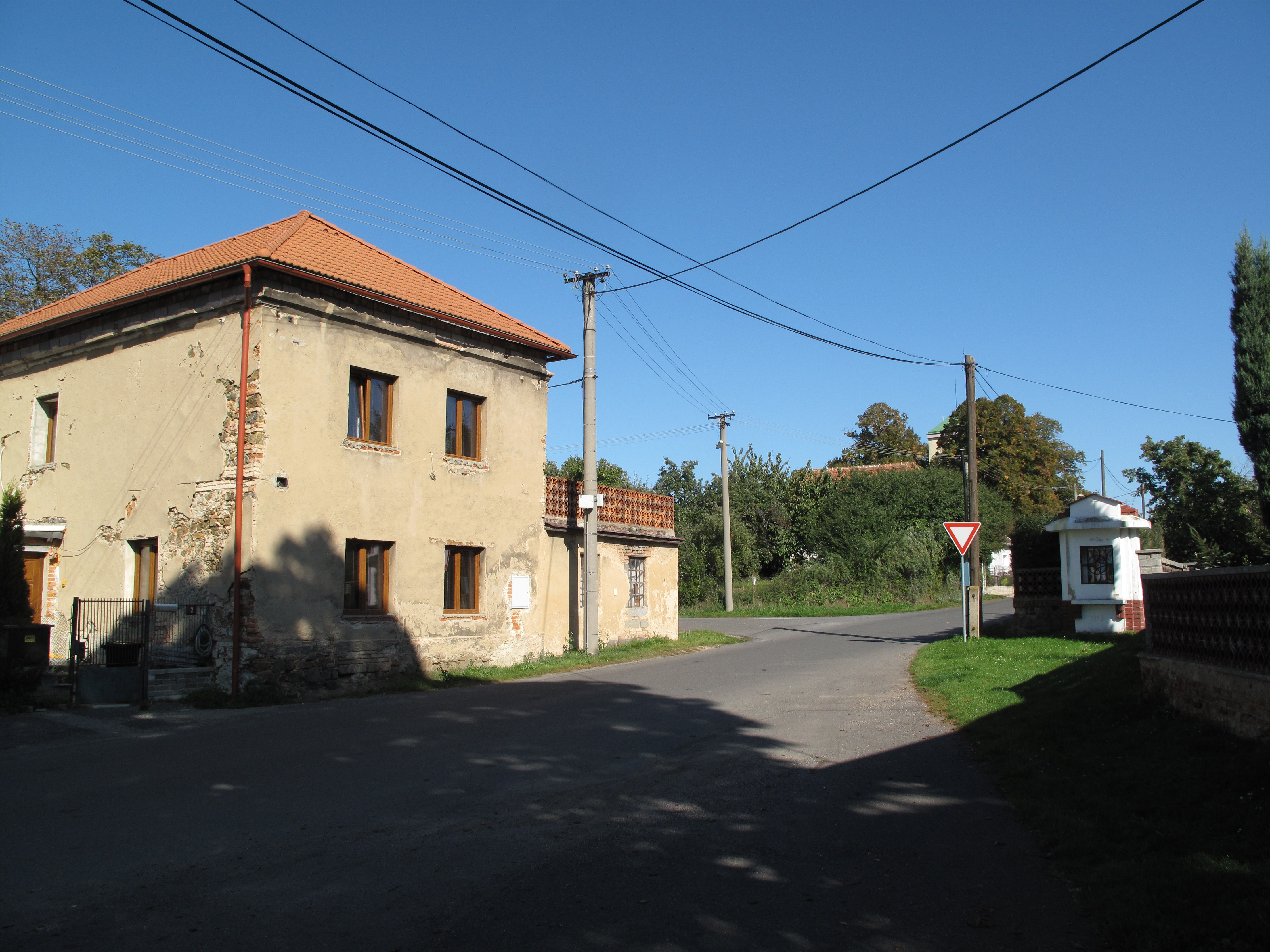 Máslovice, okres Praha-východ. Pražská čp. 2 a výklenková kaplička sv. Vojtěcha.